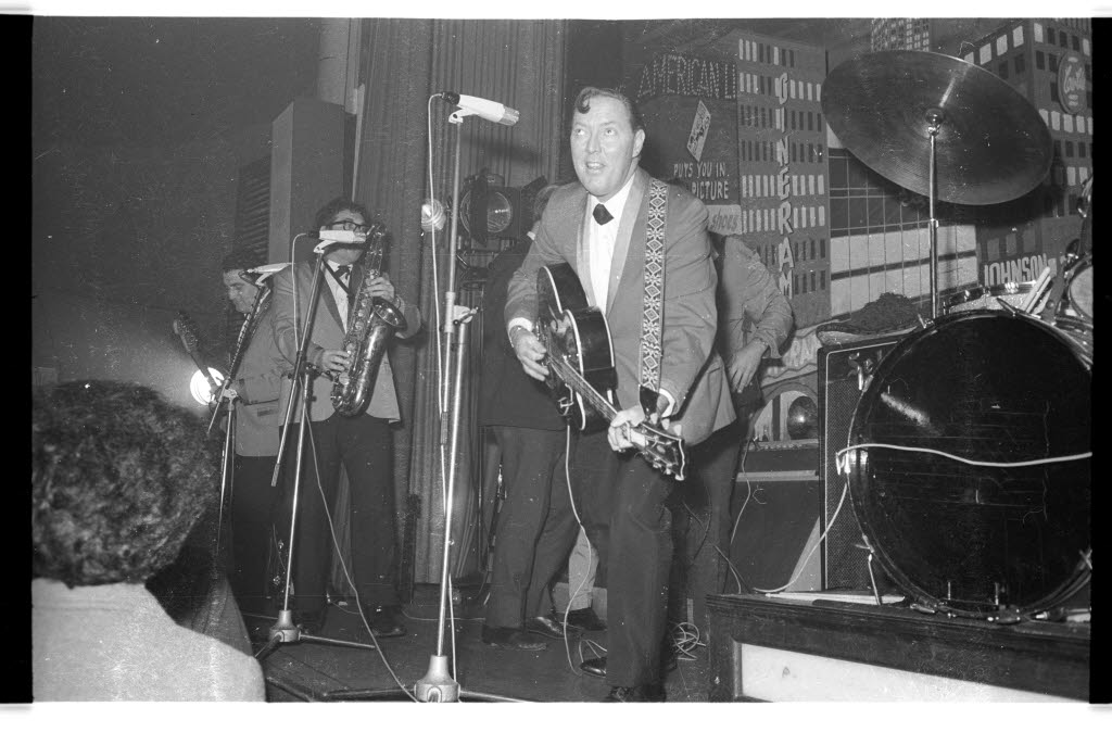 im Starpalast im Karlstal 42 in Gaarden.